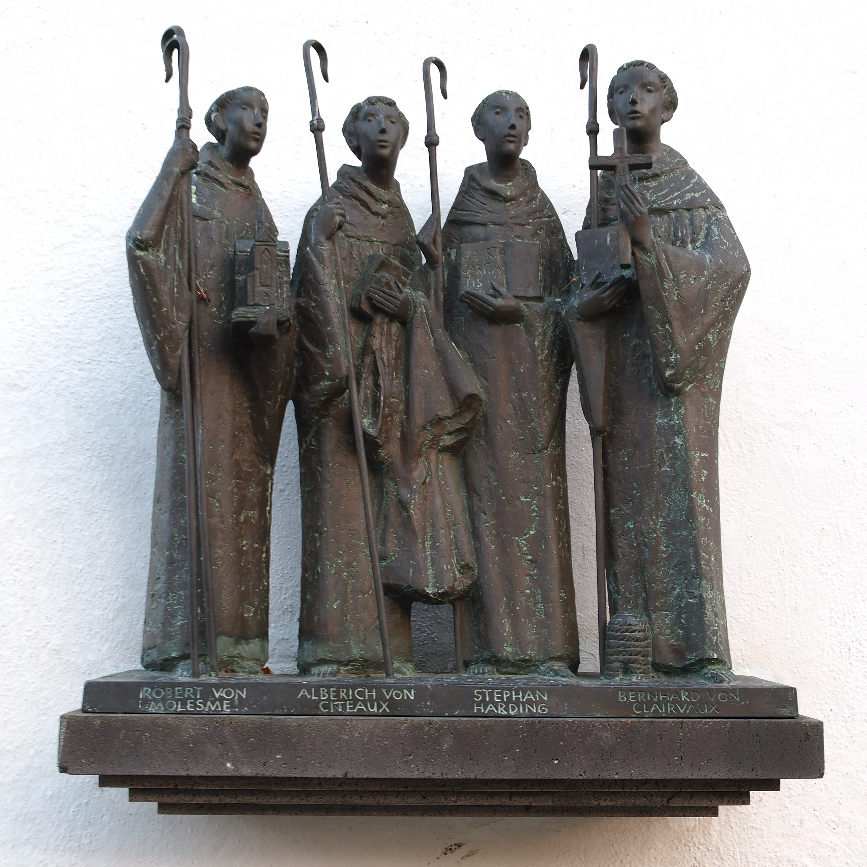 Die vier Reformäbte des Zisterzienserordens. Bronzeplastik von Werner Franzen, 1992/1997; im Umfeld des Altenberger Doms